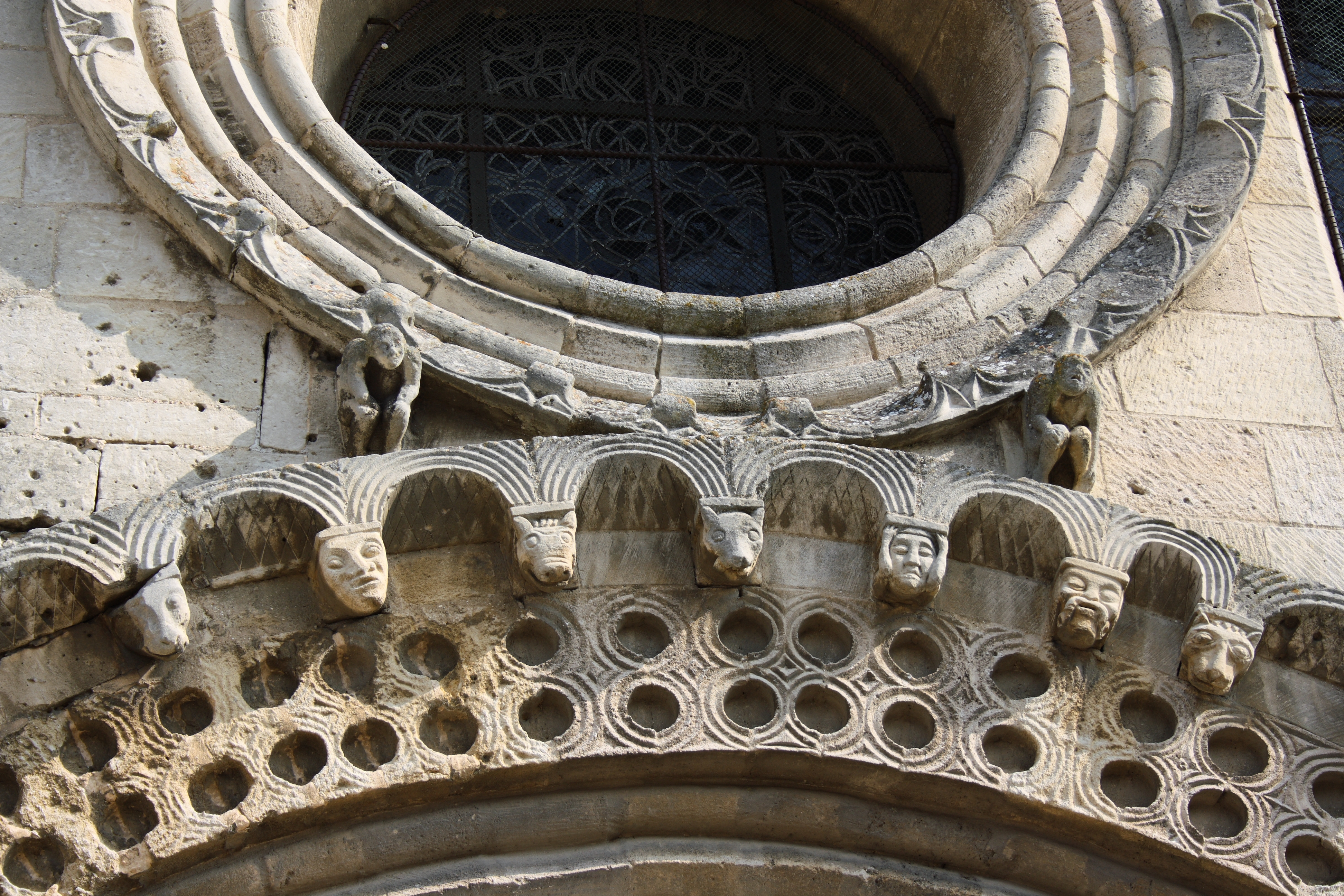 Kirche Sainte-Anne in Gassicourt, einem Stadtteil von Mantes-la-Jolie im Département Yvelines (Île de France), romanisches Portal, Archivolte mit skulptierten Köpfen